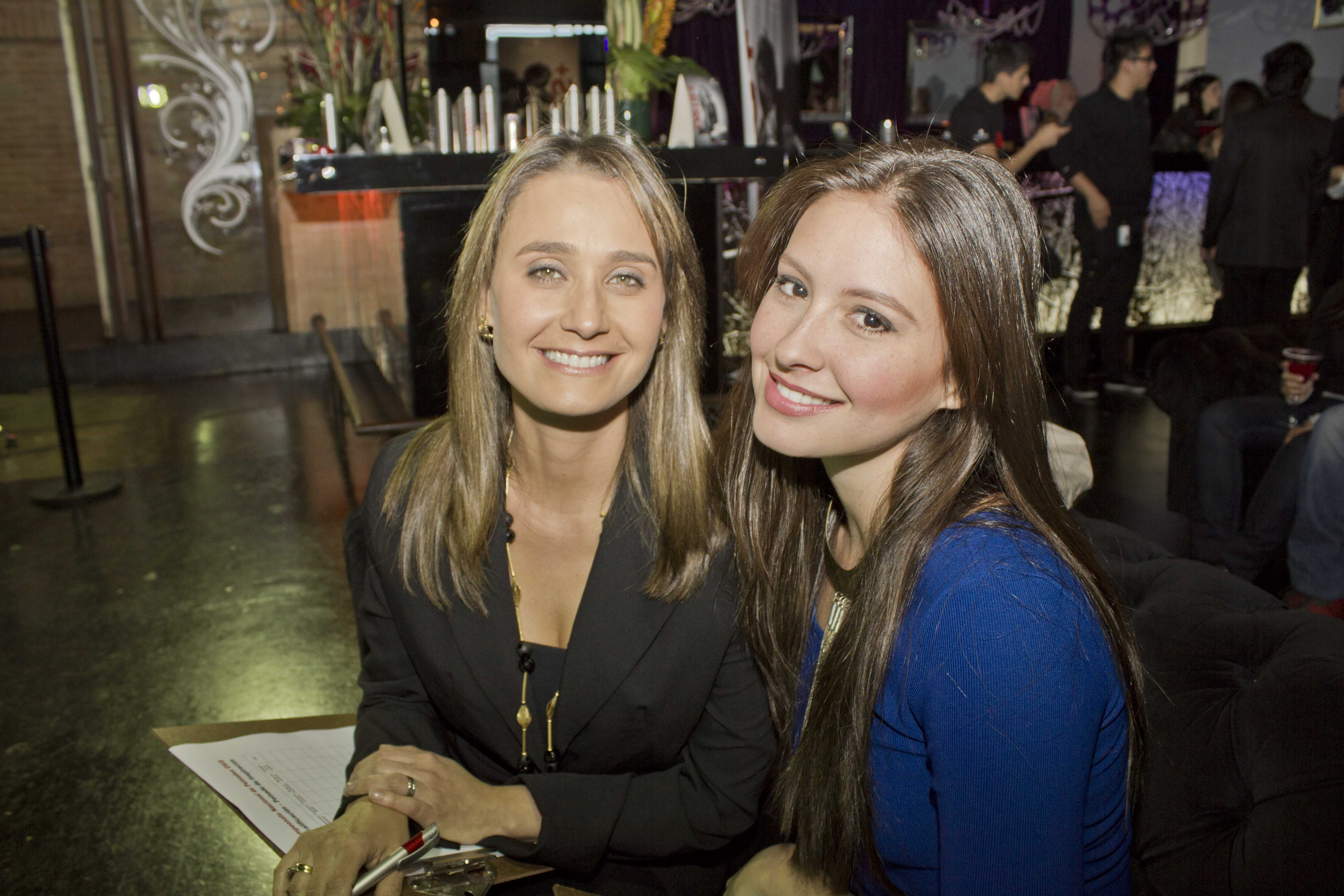 Inés María Zabaraín y Talian Vargas en Campeonato Nacional de Peinados OSIS